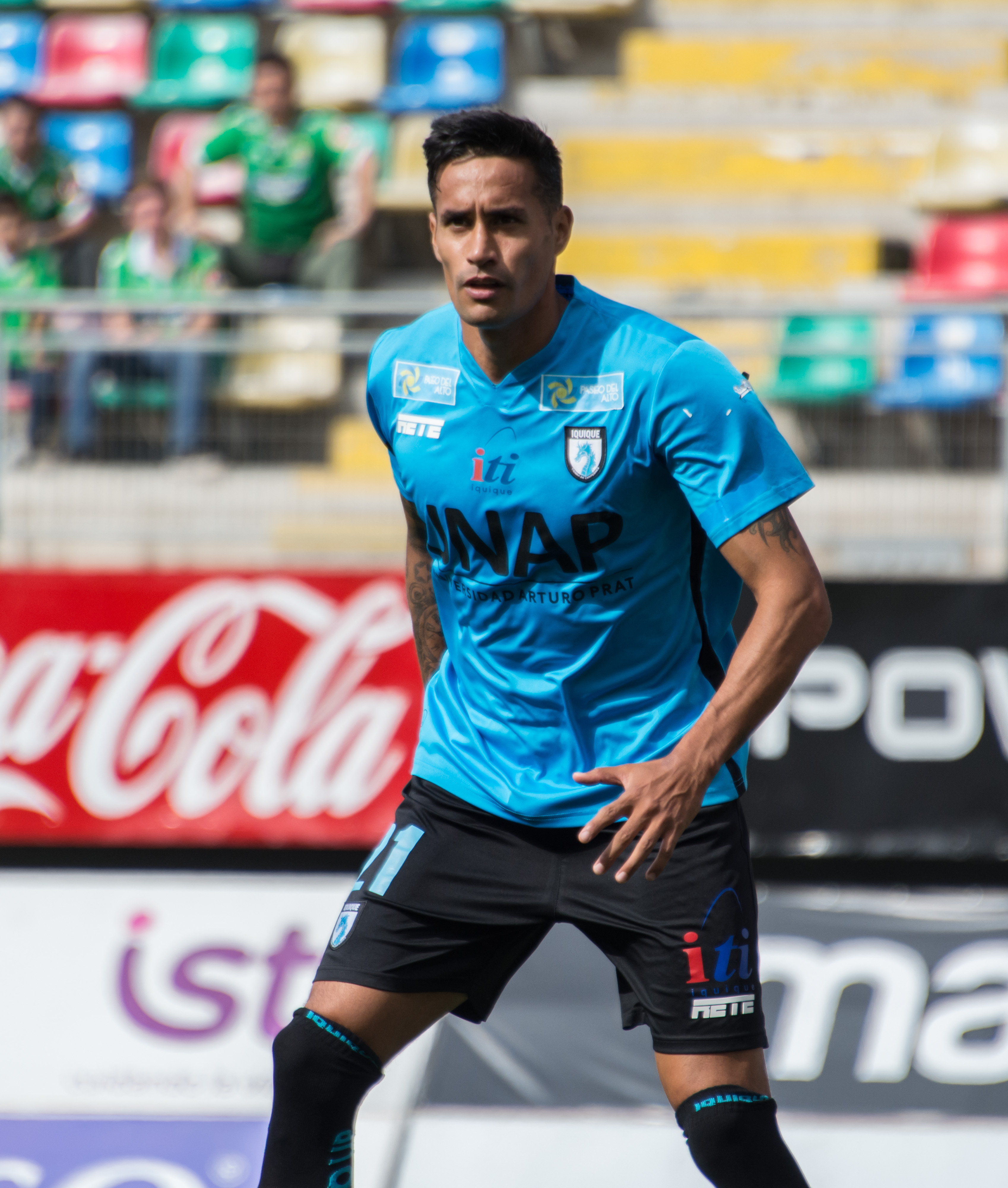 Raúl Becerra, Audax Italiano v Deportes Iquique, Estadio Bicentenario de La Florida, La Florida, Santiago, Chile